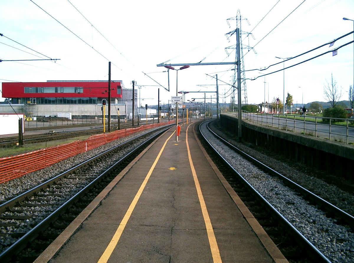 De Mëttelquai vu Belval-Schmelz, lo Belval-Université . Source: Eege Foto vum User:Pecalux; Datum: 10.11.2006